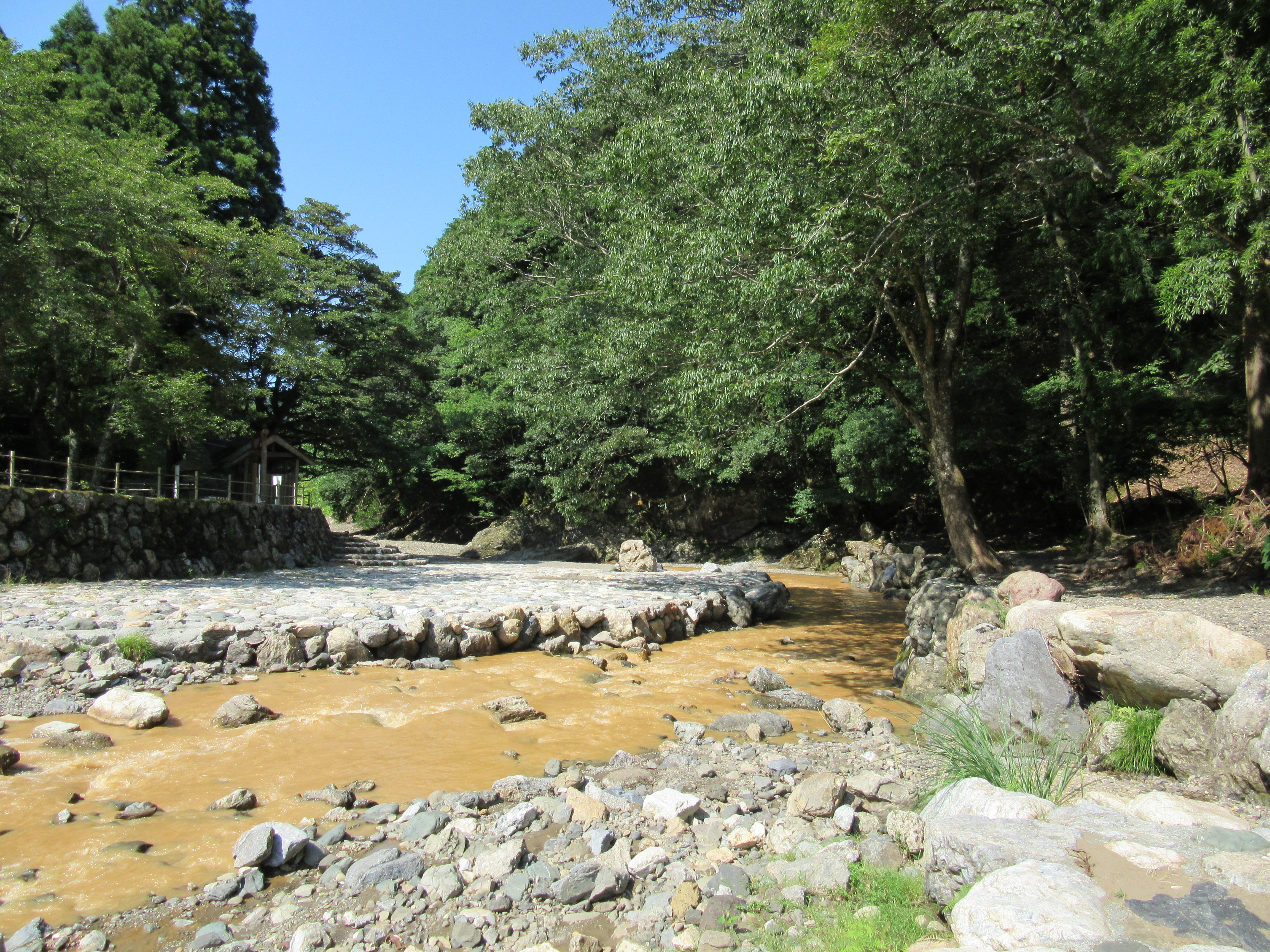 遠敷川・鵜の瀬